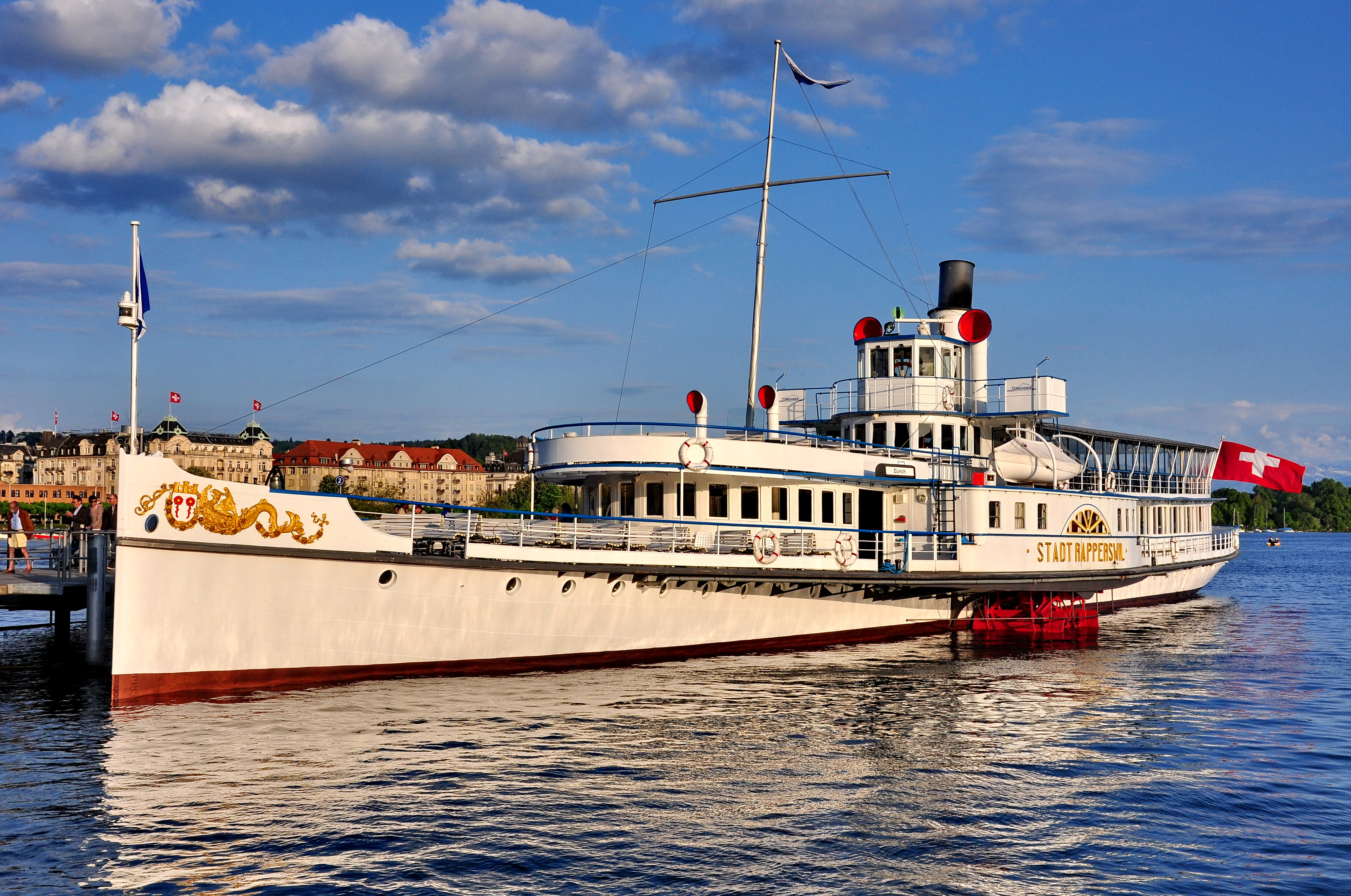 Zürichsee-Schifffahrtsgesellschaft (ZSG) paddle steamship Stadt Rapperswil at Bürkliplatz in Zürich (Switzerland)